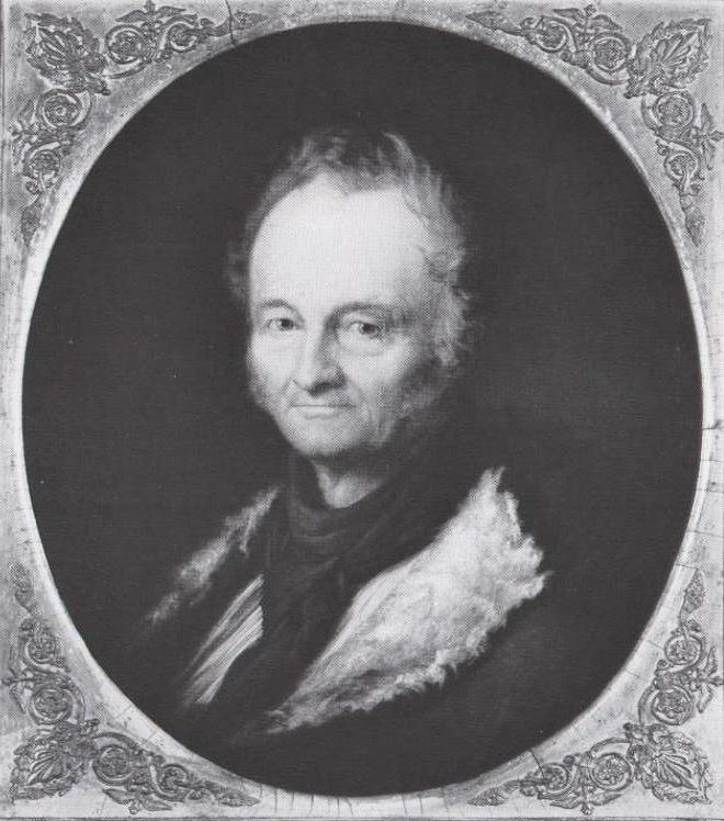 Jakob Friedrich Dyckerhoff (1774-1845), deutscher Architekt und Maler